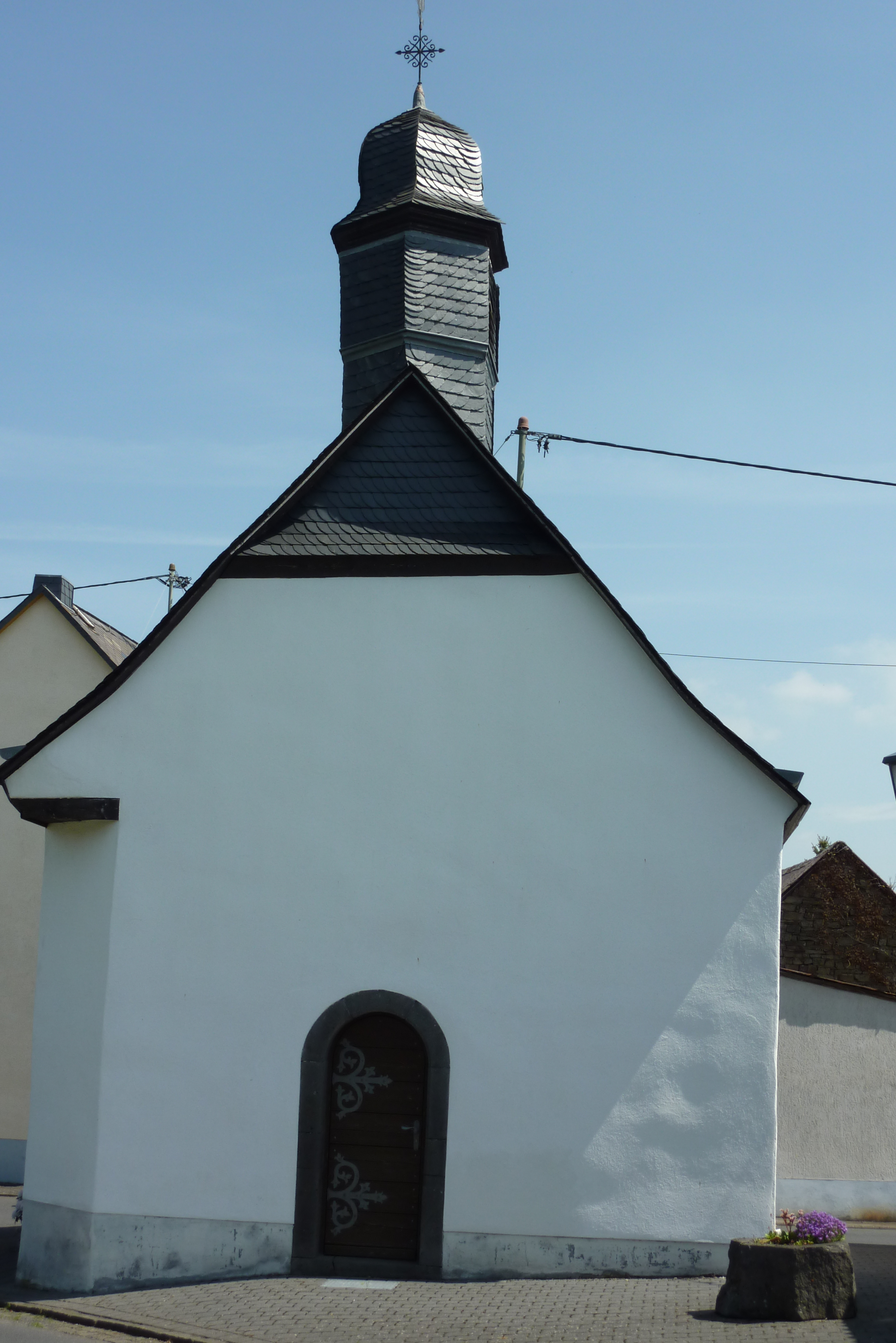 Kapelle St. Apollonia in Hirten, Eingangsseite